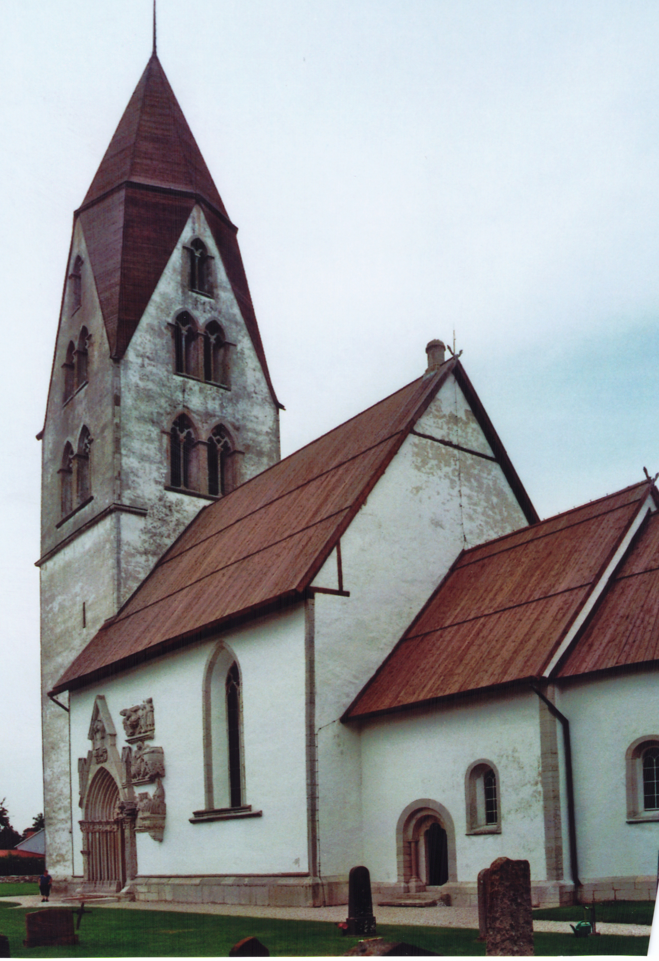 Kirche von Stånga, Gotland